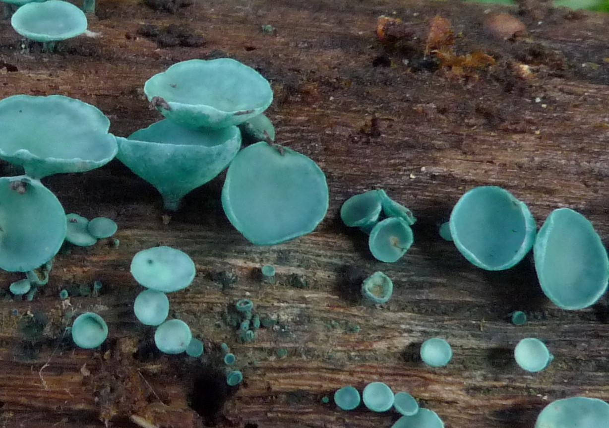 Chlorociboria aeruginosa, forêt de Haute-Sève (St-Aubin-du-Cormier, Ille-et-Vilaine, Bretagne, France)